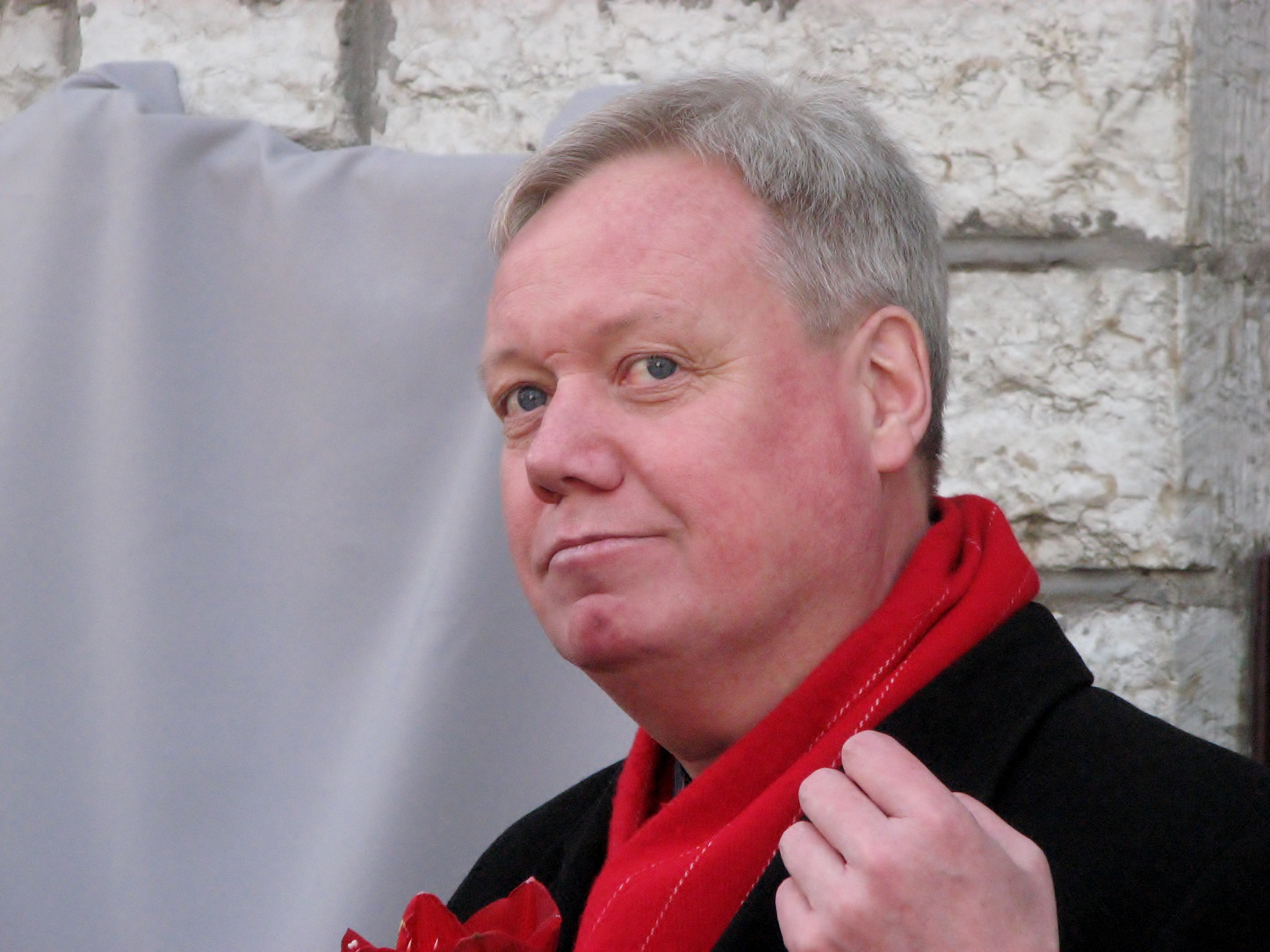 Toomas Lõhmuste Särevi teatritoa välisukse juures uue infotahvli avamisel